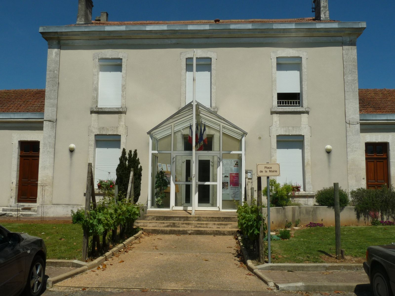 mairie de St-Sornin, Charente, France